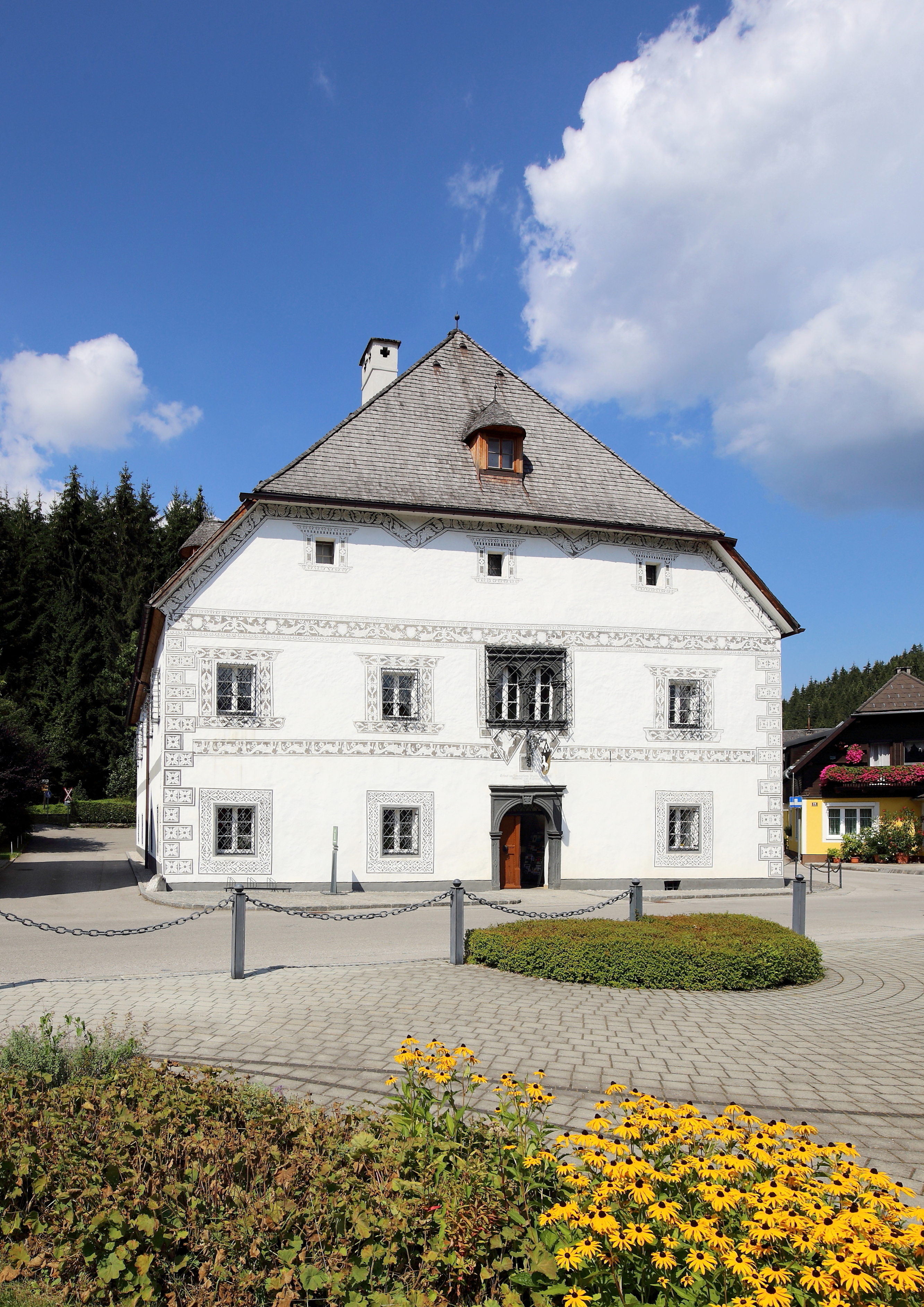 Das sogenannte Amonhaus in der niederösterreichischen Marktgemeinde Lunz am See.Ein frühneuzeitliches ehemaliges Hammerherrenhaus, das 1551 von dem Hammerherrn Martin Ofner errichtet und um 1600/10 erweitert wurde. Um 1770 kam es in den Besitz der Familie Amon und ist seit 1960/61 im Besitz der Gemeinde, die darin das Gemeindeamt und ein Museum einrichtete.